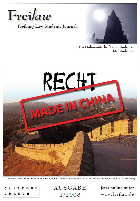 Titelbild und Werbeplakat der Ausgabe 1/2008 von "Freilaw - Freiburg Law Students Journal"